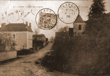 Lindry (Yonne) - Grand'rue vers 1900.